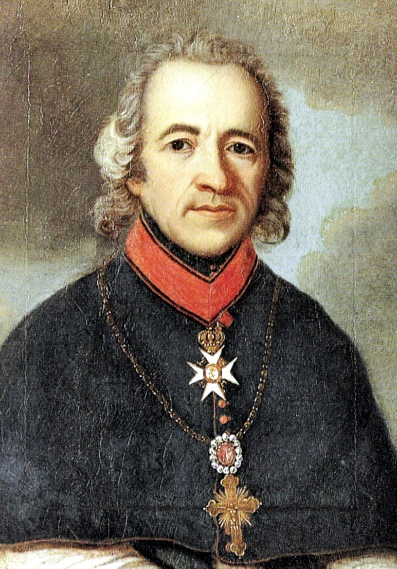 Johann Baptist von Keller, Bischof von Rottenburg 1828-1845, Gemälde im Eingangsraum des Bischofshauses in Rottenburg